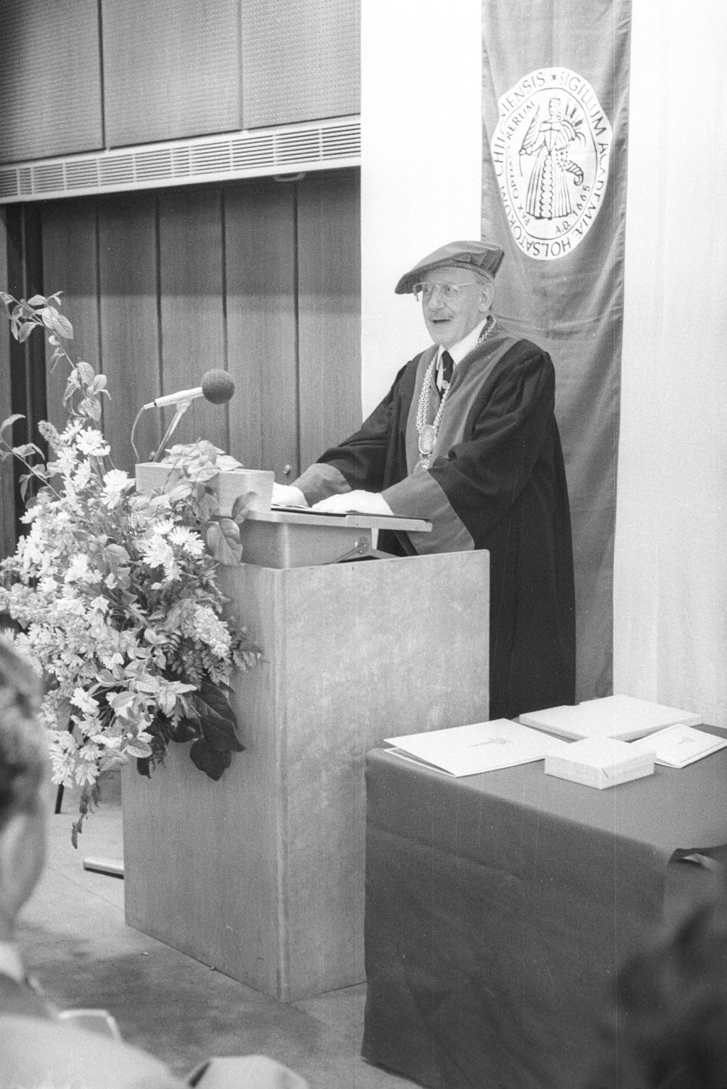 im Audimax der Christian-Albrechts-Universität (CAU). Am Rednerpult CAU-Präsident Prof. Dr. Gerd Griesser.